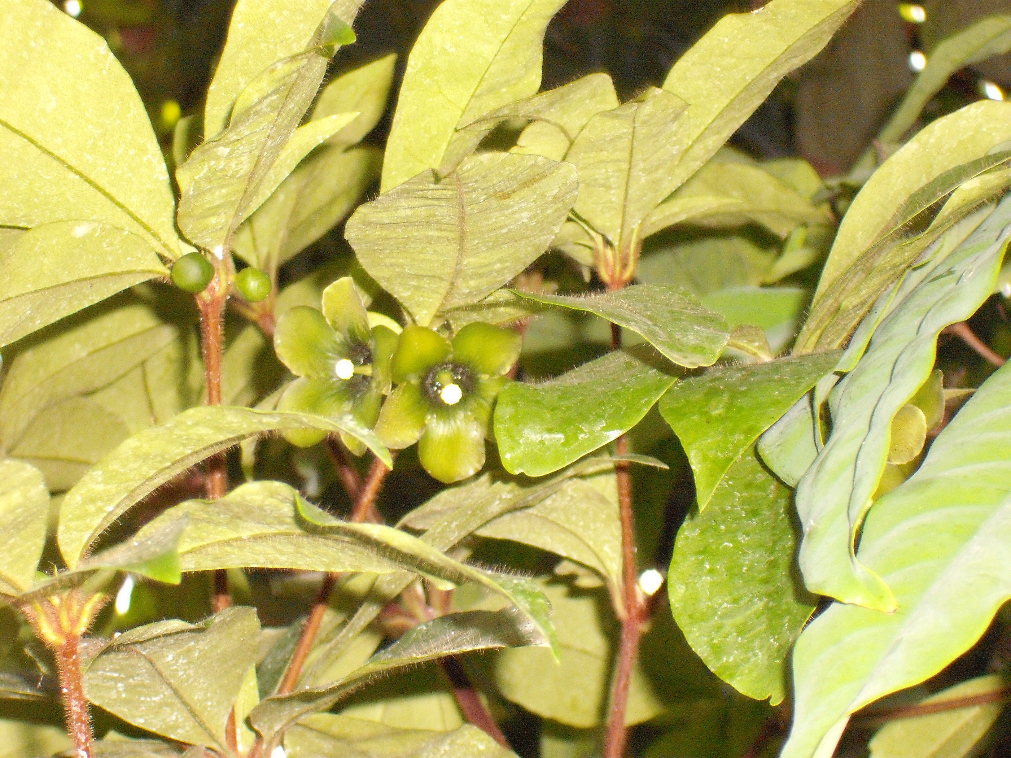 Deheranina smaragdina Blüten und -knospen